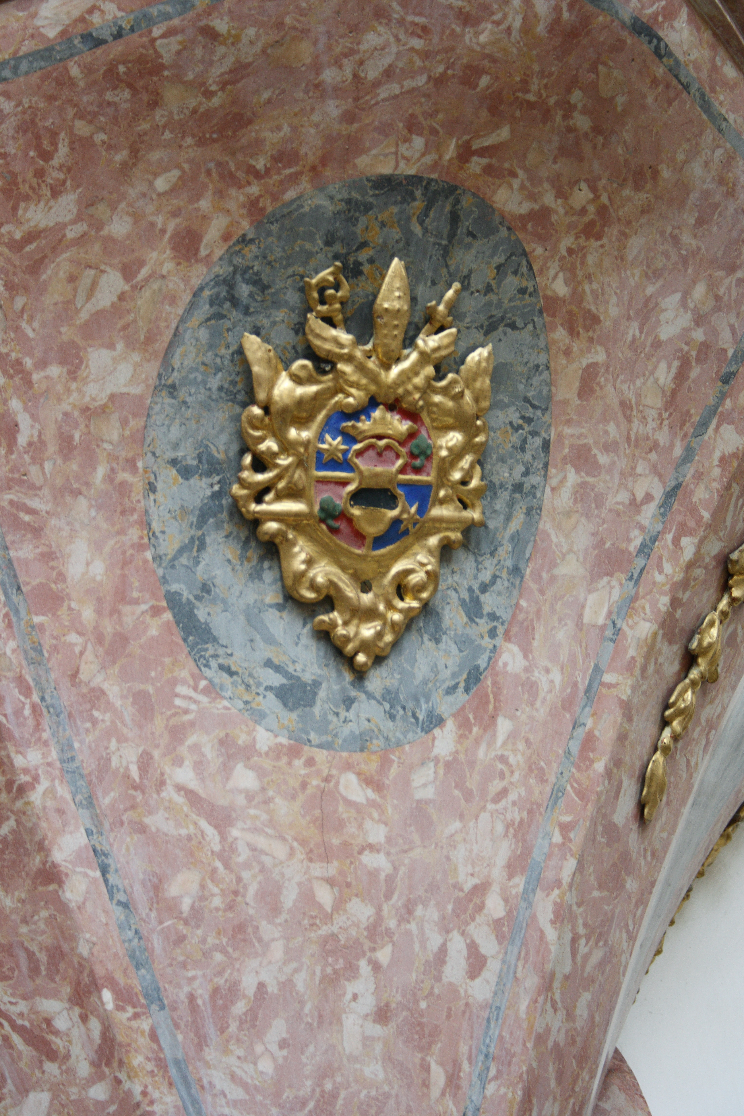 Katholische Pfarrkirche St. Martin in Deubach, einem Stadtteil von Ichenhausen im Landkreis Günzburg (Bayern), 1739/40 von Johann Martin Kraemer errichtet, Wappen am Kanzelfuß: Wappen des Melchior Gast, Propst von Wettenhausen